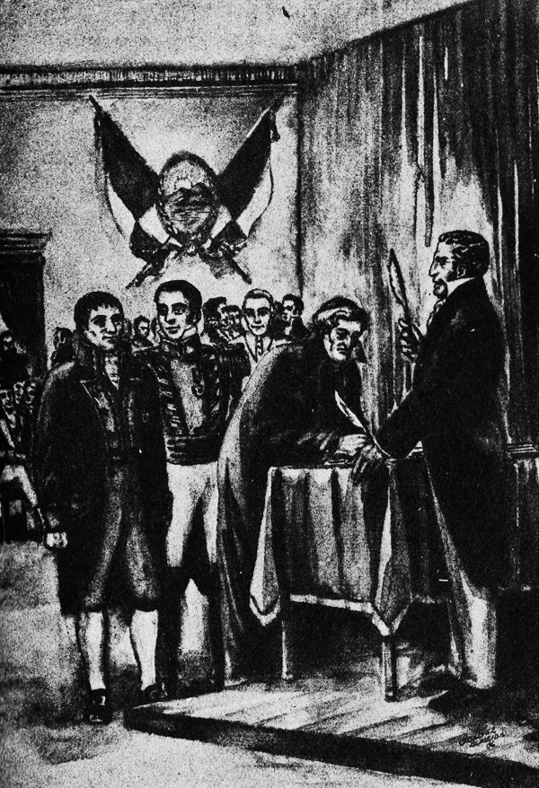 firmacion de acta del peru